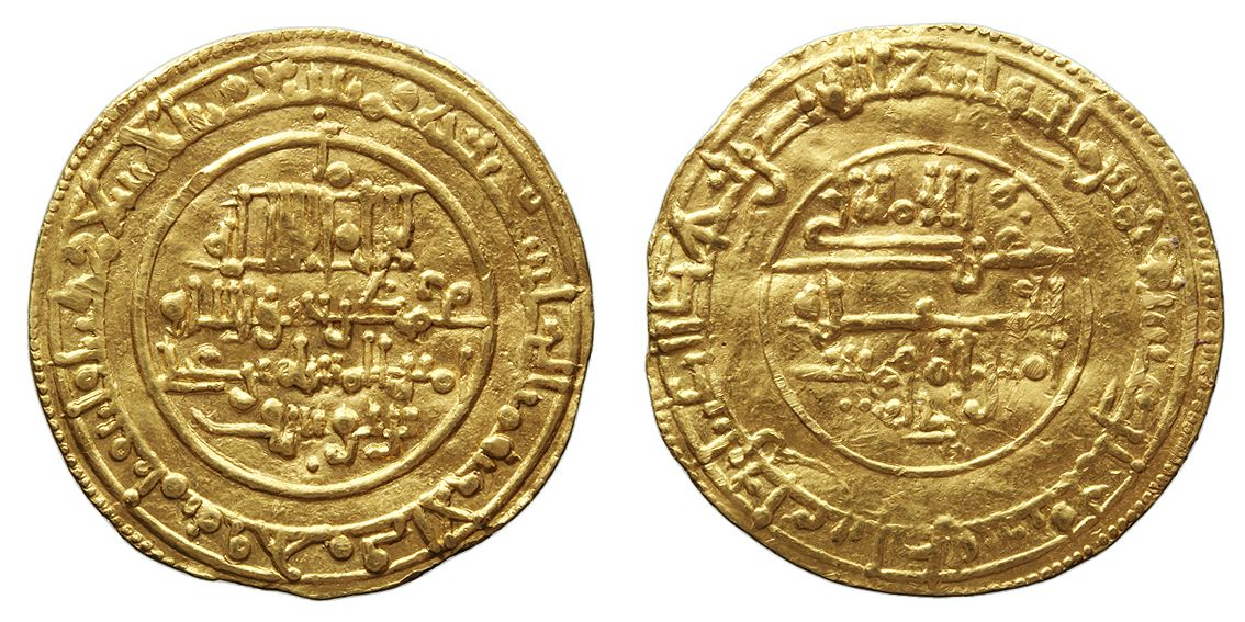 Dinar d'or emès per Alí ibn Yússuf, a Granada. Any 518 de l'Hègira.